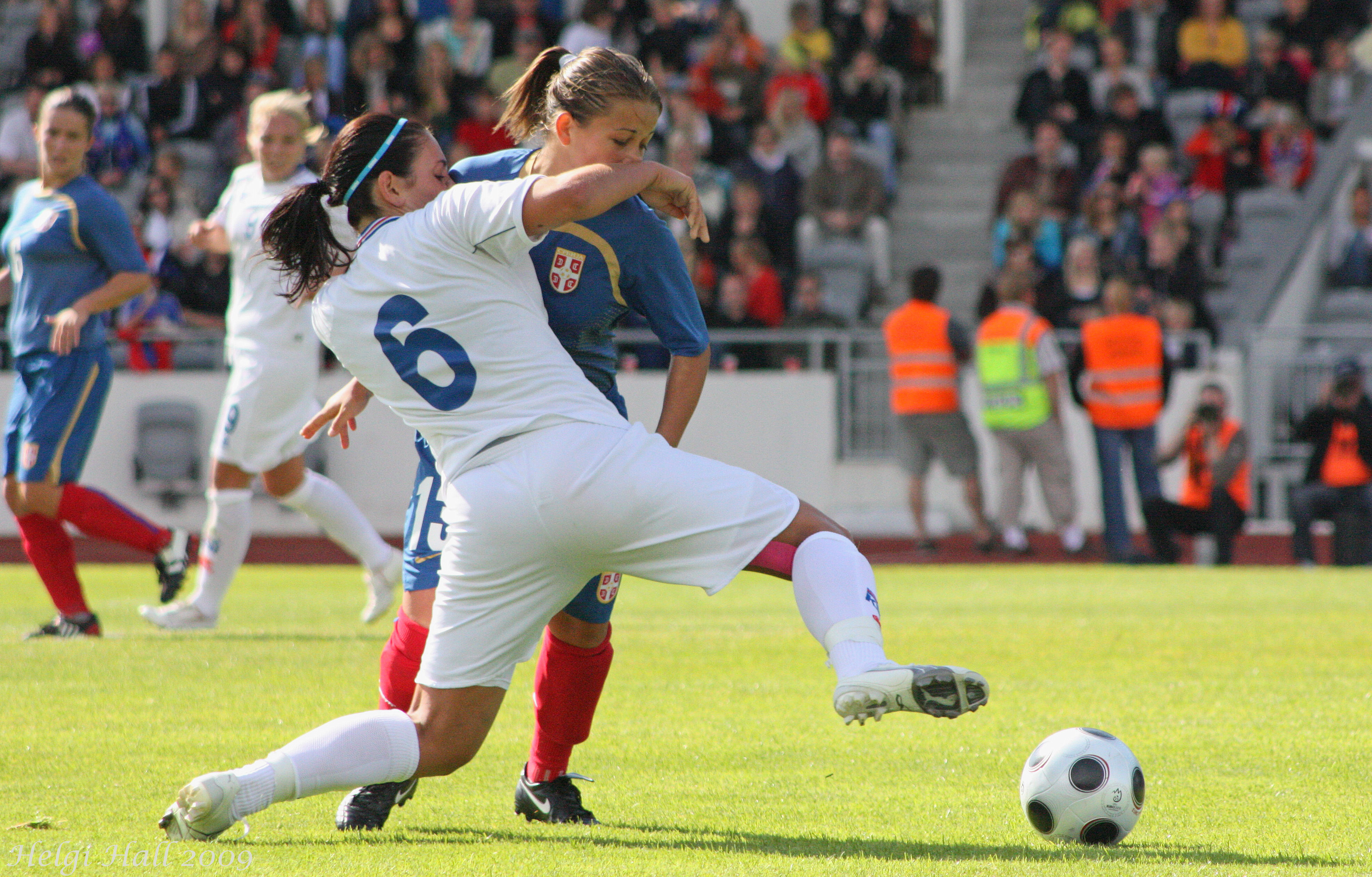 Næsti leikur Íslands í þessari keppni er gegn Eistlandi 17. september hér á Laugardalsvelli. Í millitíðinni leikur liðið hins vegar í úrslitakeppni EM og þar er fyrsti leikur gegn Frökkum á mánudaginn eftir rúma viku.